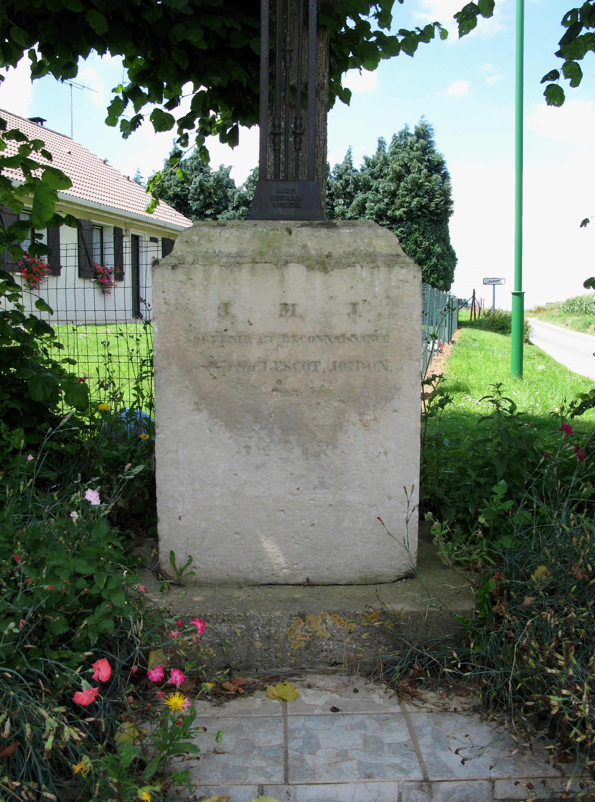 Pissy (Somme, France) - Base du calvaire dressé au carrefour de la route menant à Bovelles. Sur la pierre est gravé : "Souvenir et reconnaissance ... LESCOT - JOIRON"